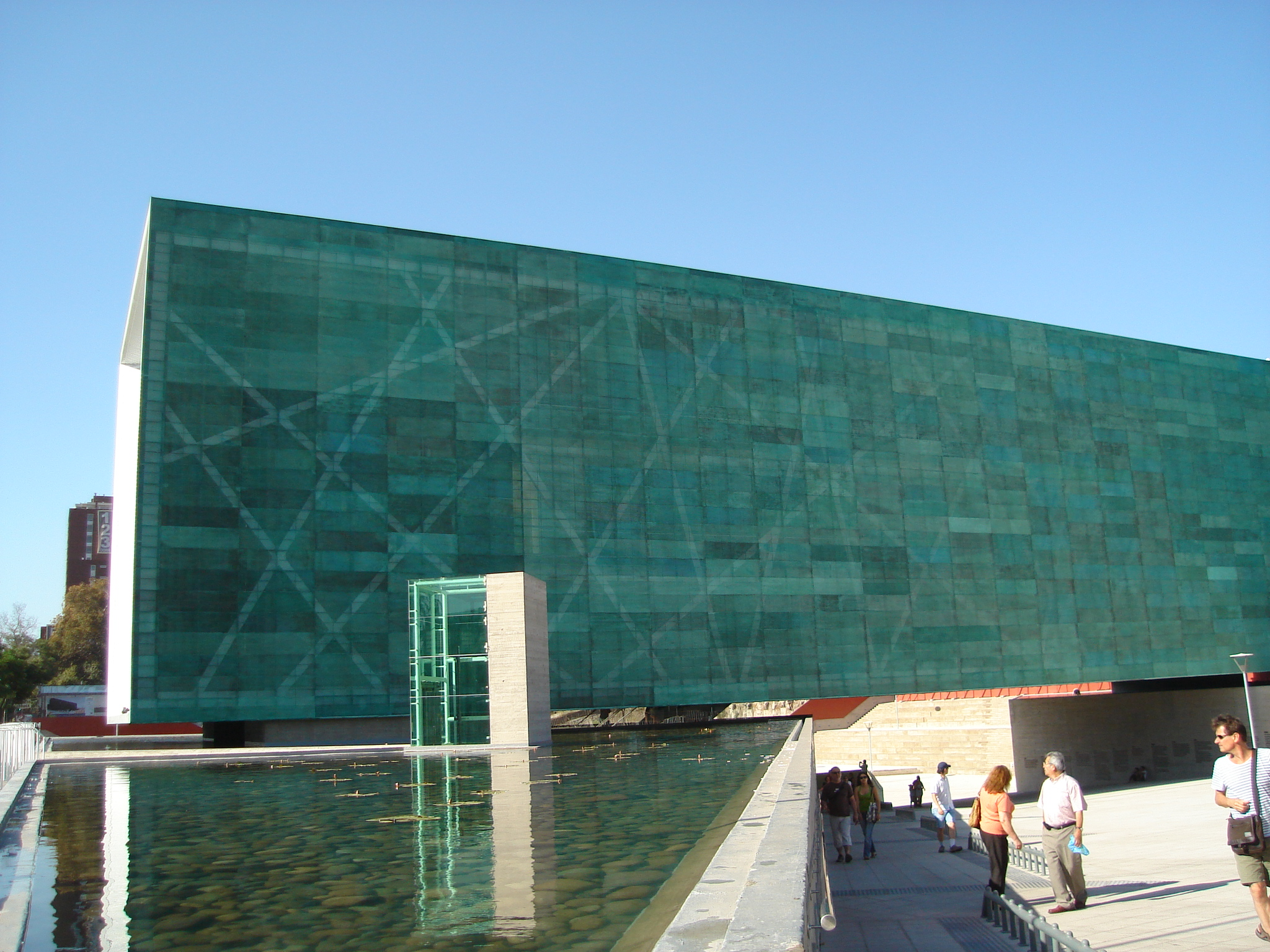 Fachada sur del Museo de la Memoria, en Santiago de Chile.